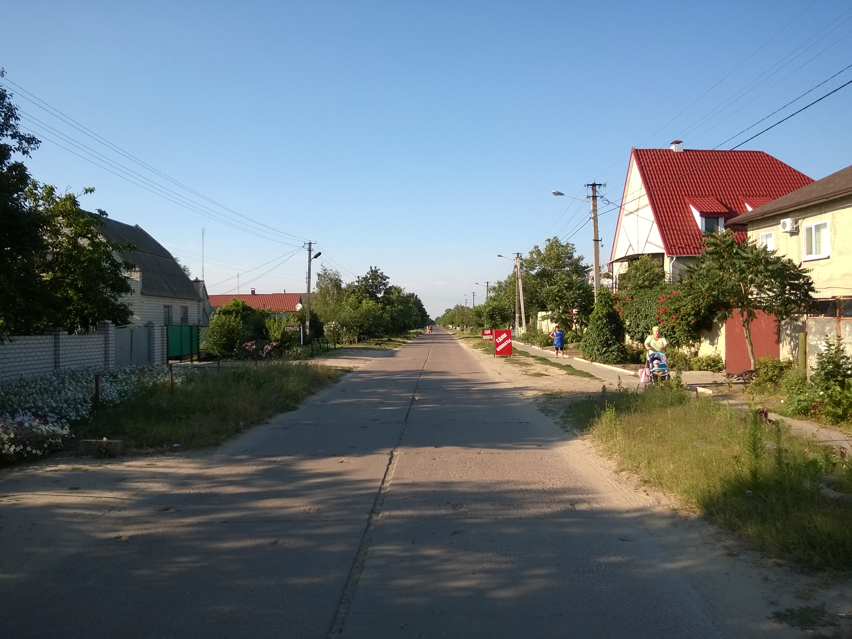 смт. Лазурне